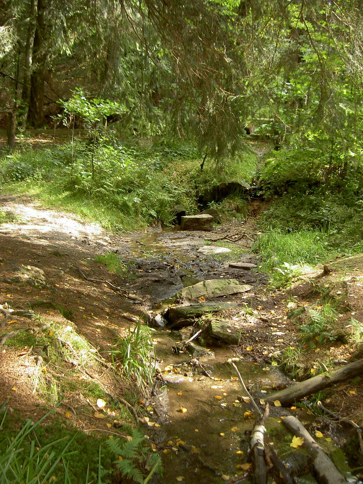 Ederquelle